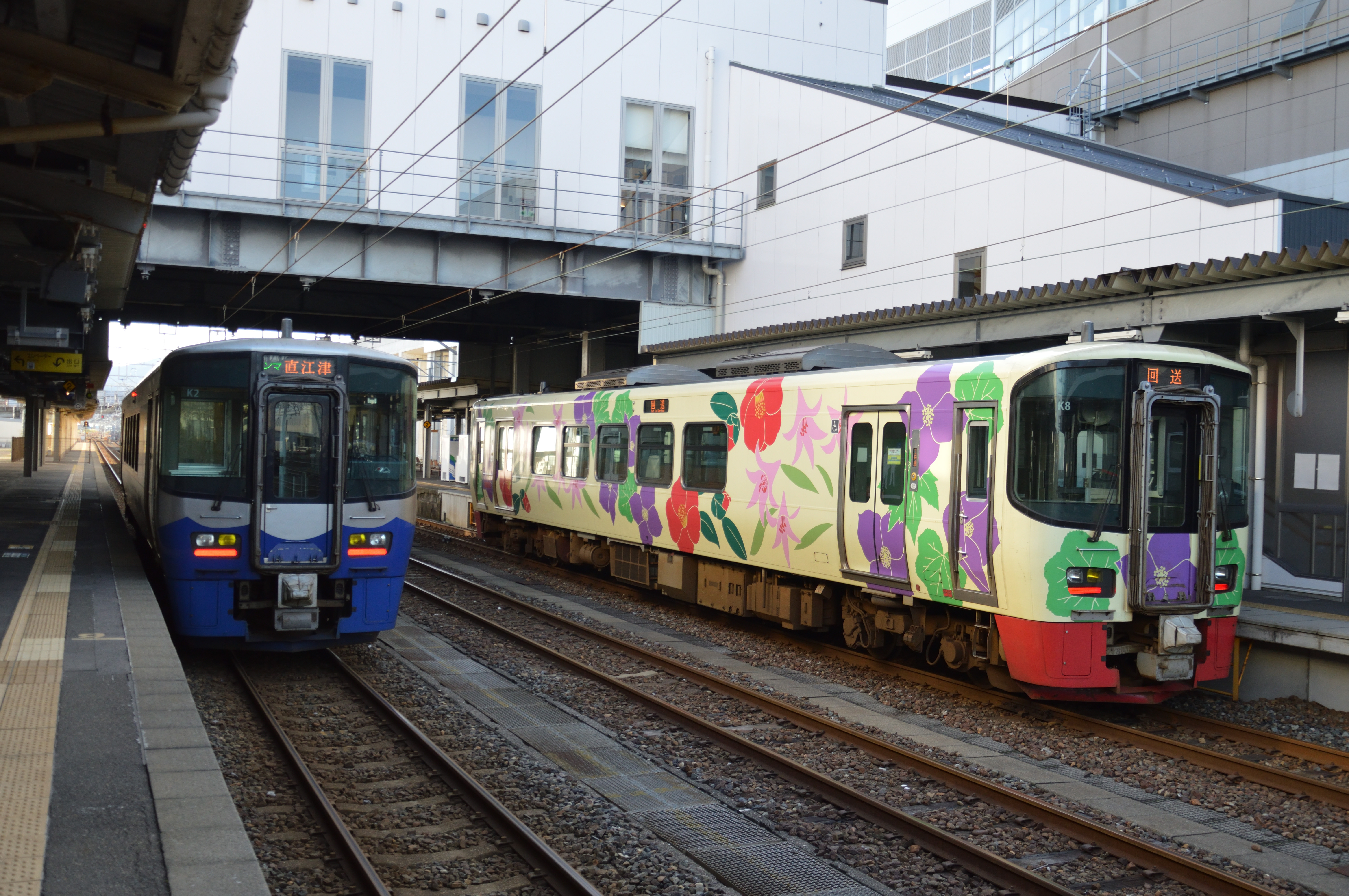 糸魚川駅に停車するET122形。 Nikon D3200